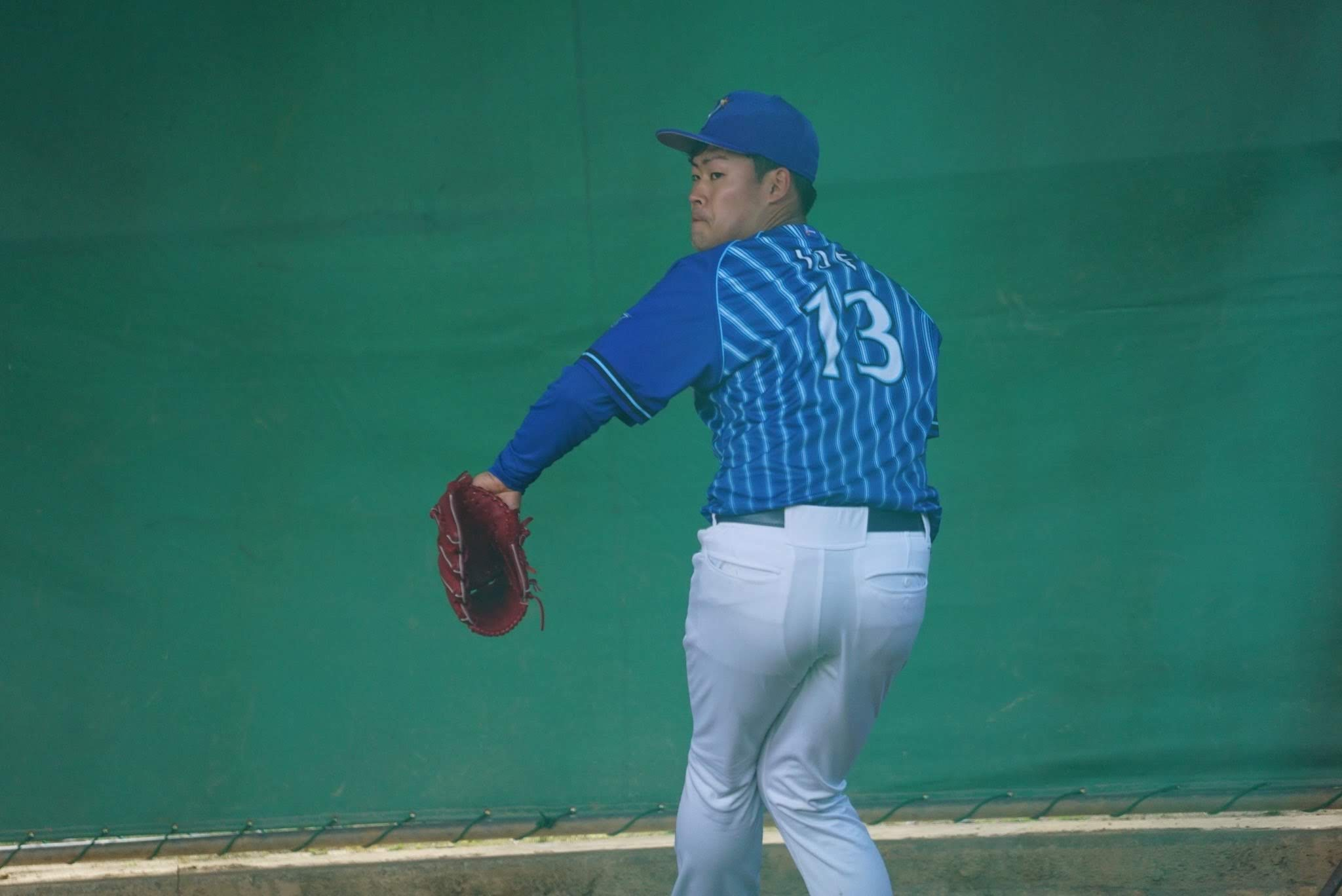 横浜DeNAベイスターズ伊勢大夢